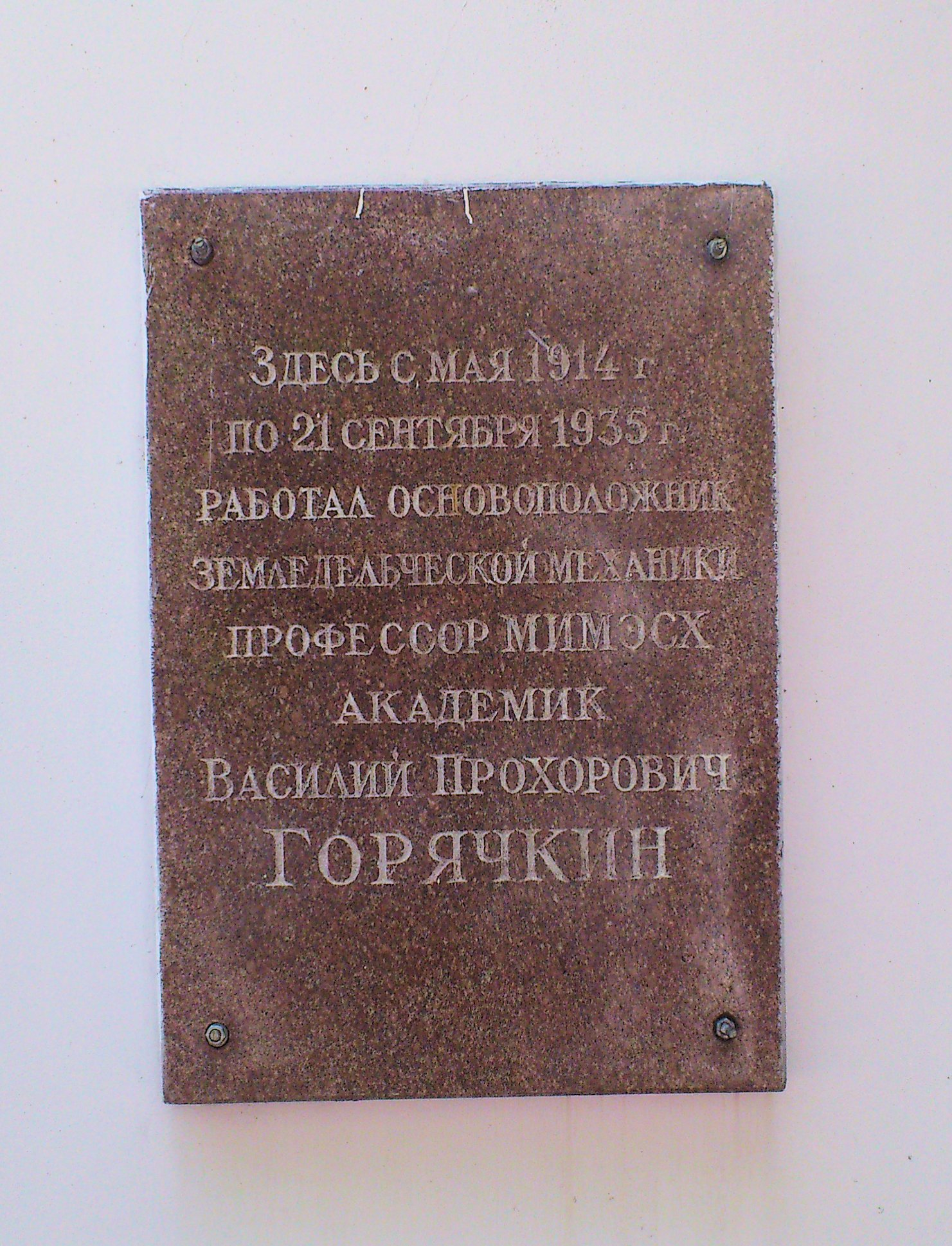 Мемориальная доска В. П. Горячкину на здании учебного корпуса № 6 Московской сельскохозяйственной академии имени К. А. Тимирязева. Москва, Лиственничная аллея, дом № 2.